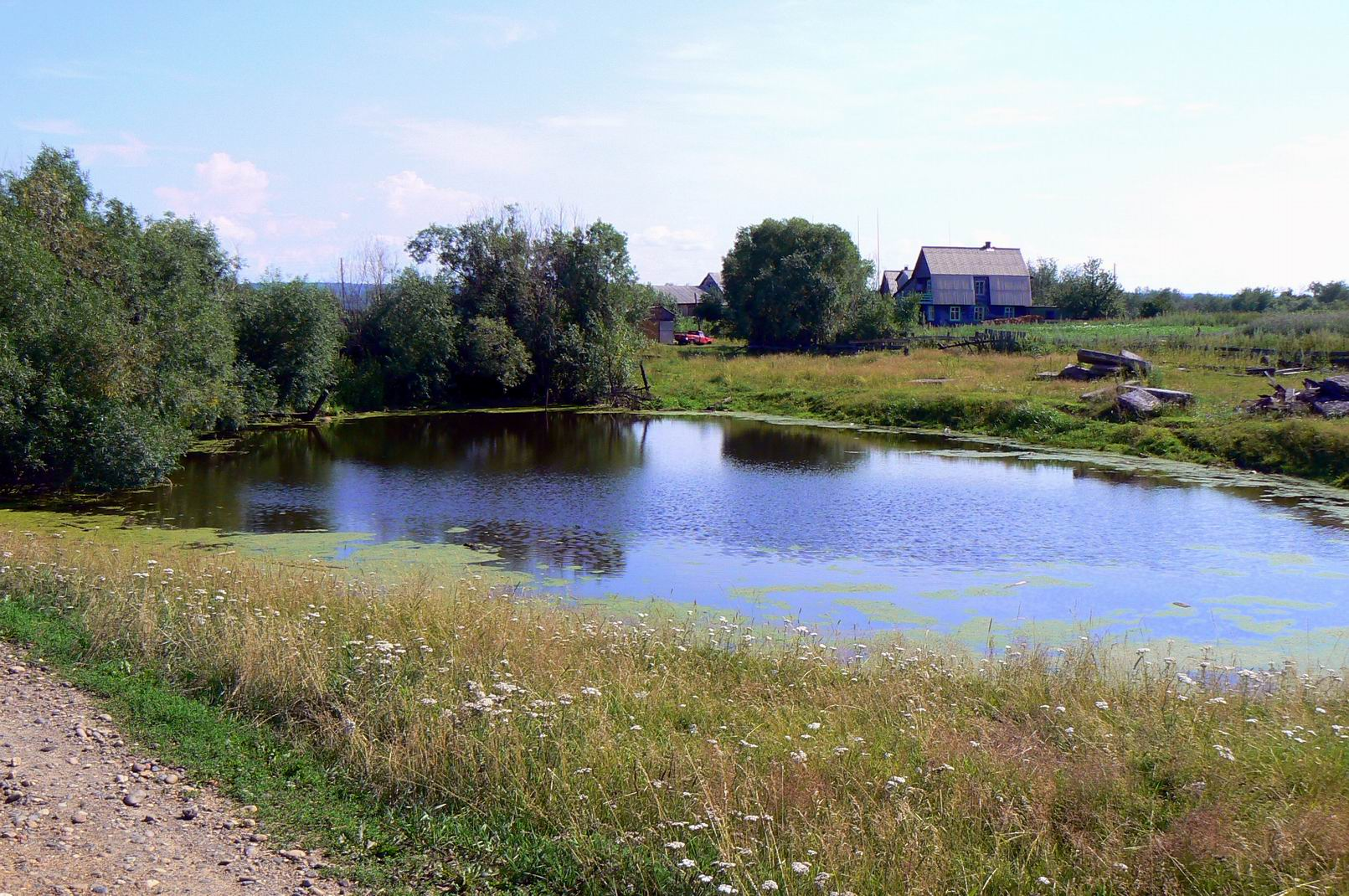 За речкой.